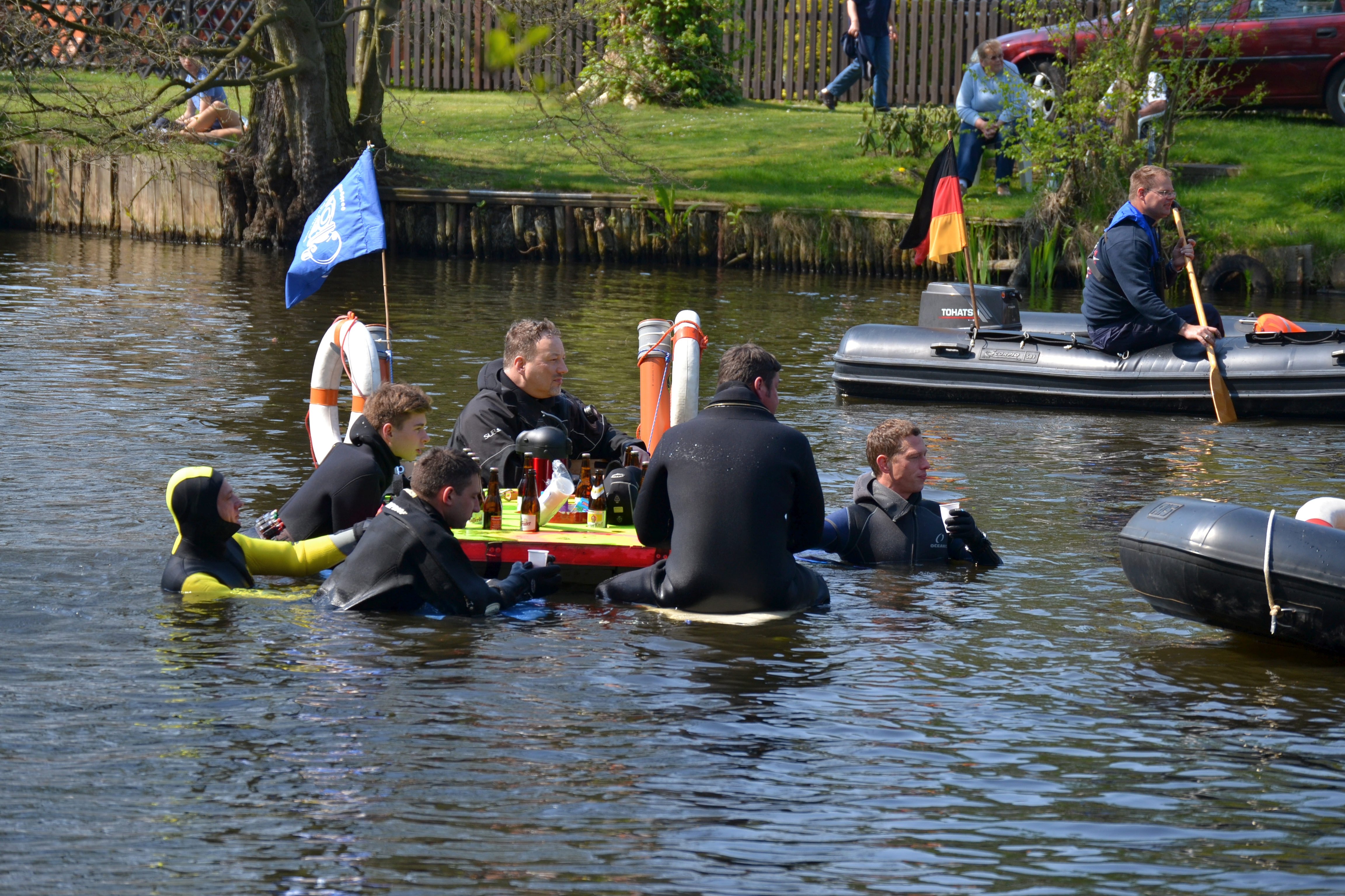 17. Spreetreiben von Neu Zittau nach Erkner am 19. April 2014 kurz hinter dem Start an der Brücke Neu Zittau